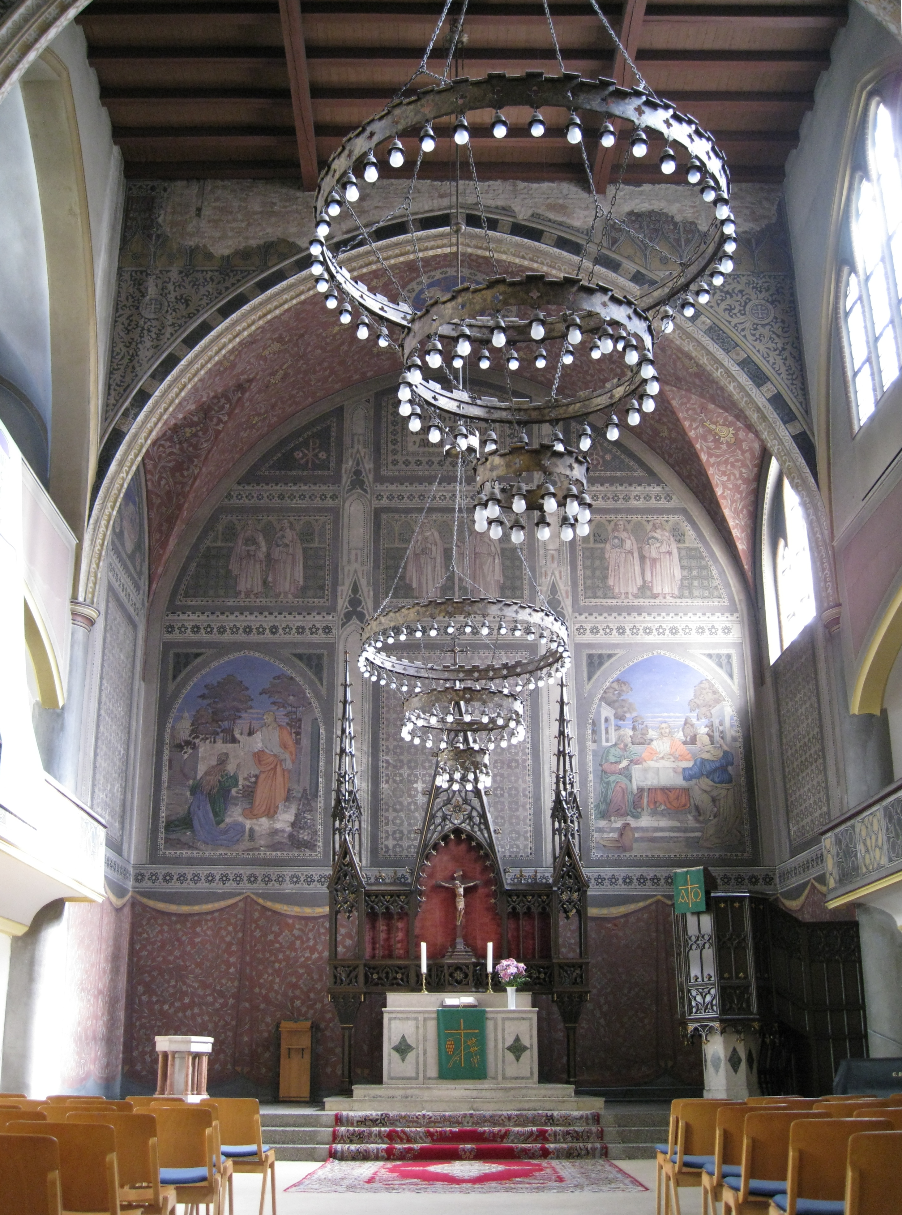 Innenraum mit Apsis der Osterkirche in Berlin-Wedding